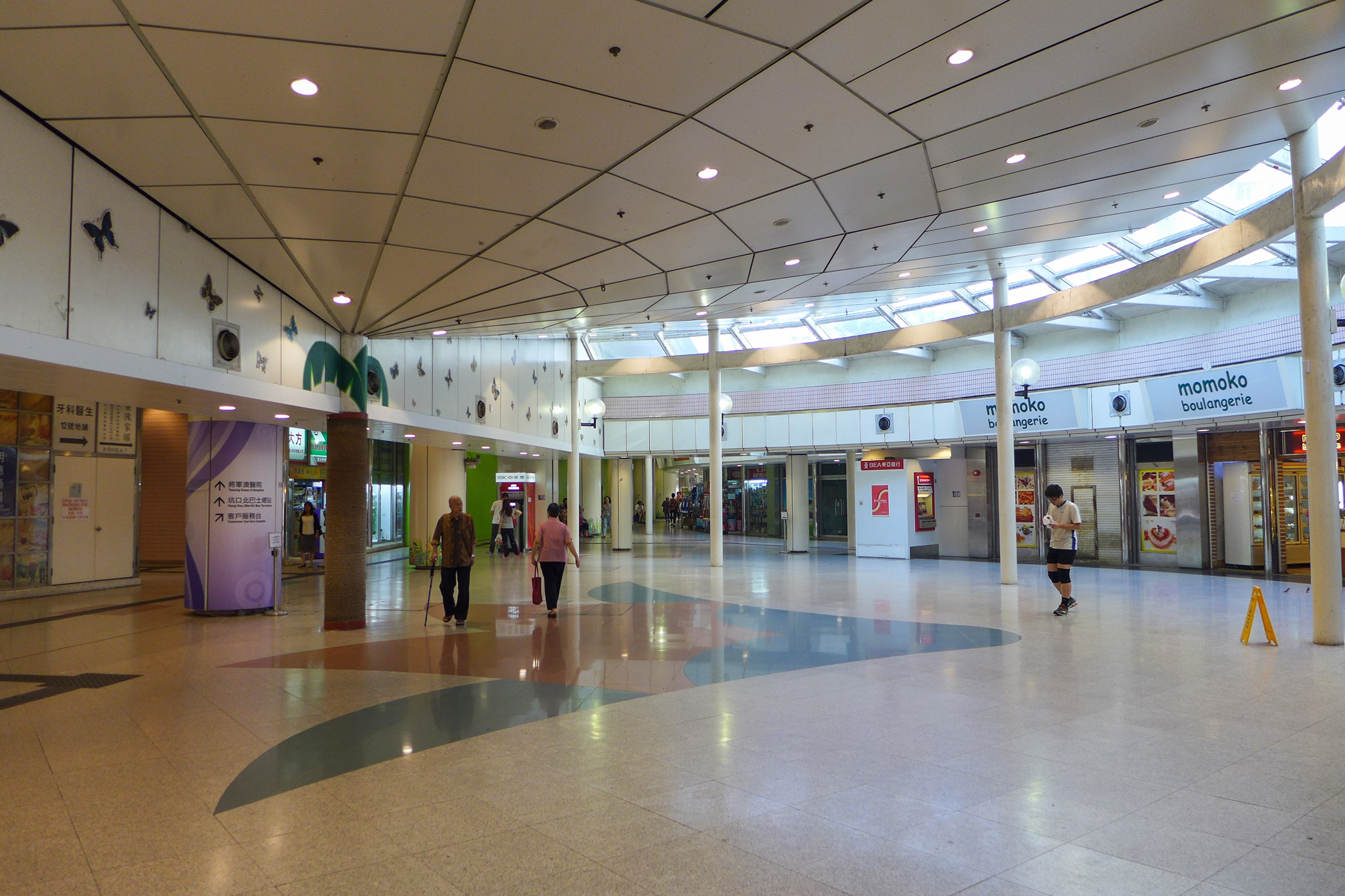 Ming Tak Shopping Centre Void